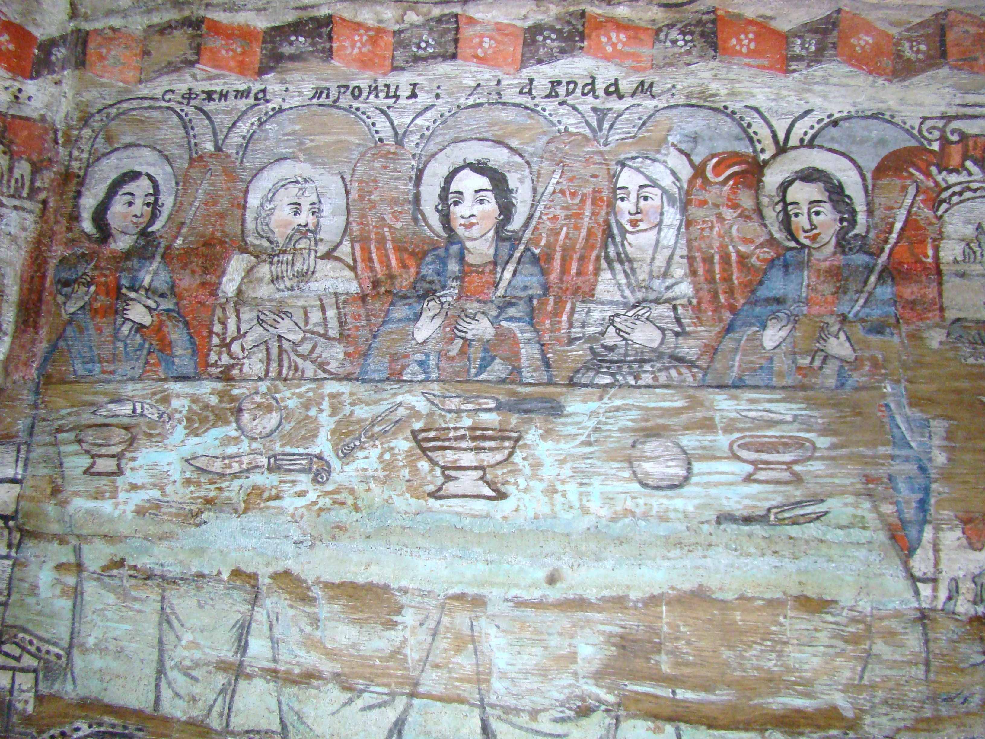 Biserica de lemn "Intrarea Maicii Domnului în Biserică" , sat BÂRSANA